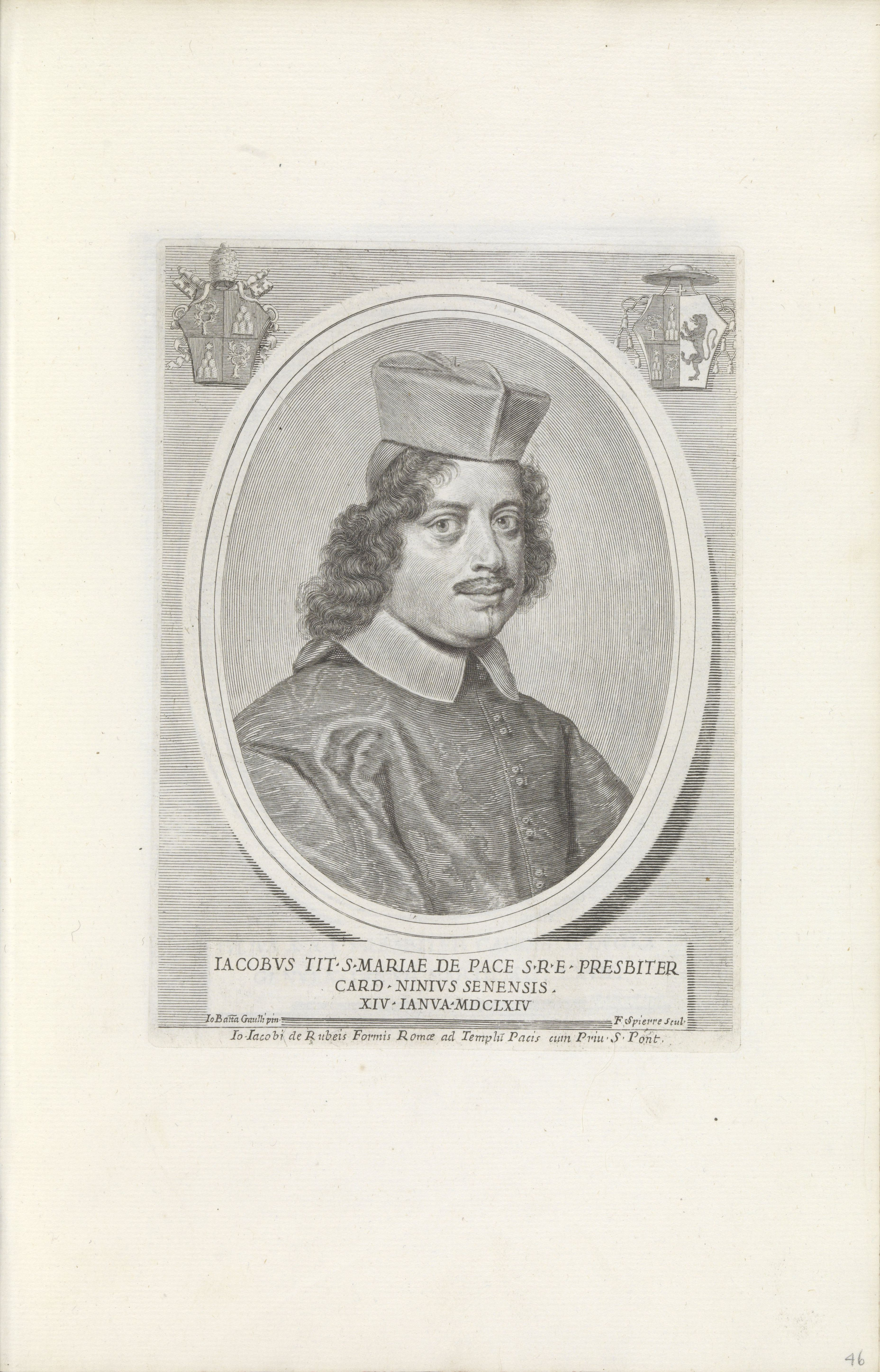 IdentificatieTitel(s): Portret van kardinaal Giacomo Filippo NiniEffigies Nomina et Cognomina S.D.N. Alexandri Papae VII et RR. DD. SRE. Cardd (...). (serietitel)Objecttype: prent albumblad Objectnummer: RP-P-1991-17-46Omschrijving: Portret van kardinaal Giacomo Filippo Nini. Linksboven het wapen van paus Alexander VII en rechtsboven het wapen van de kardinaal. Onderaan een onderschrift in het Latijn. De prent maakt deel uit van een album.VervaardigingVervaardiger: prentmaker: François Spierre (vermeld op object)naar schilderij van: Giovanni Battista Gaulli (vermeld op object)uitgever: Giovanni Giacomo de'Rossi (vermeld op object)verlener van privilege: Pauselijk hof (vermeld op object)Plaats vervaardiging: RomeDatering: 1664 - 1681Fysieke kenmerken: gravureMateriaal: papier Techniek: graveren (drukprocedé)Afmetingen: plaatrand: h 193 mm × b 141 mmToelichtingHet portret is toegevoegd aan een serie kardinaalsportretten uitgegeven in 1658.OnderwerpWat: cardinalWie: Giacomo Filippo NiniVerwerving en rechtenCredit line: Aankoop uit het F.G. Waller-FondsVerwerving: aankoop 1991Copyright: Publiek domein